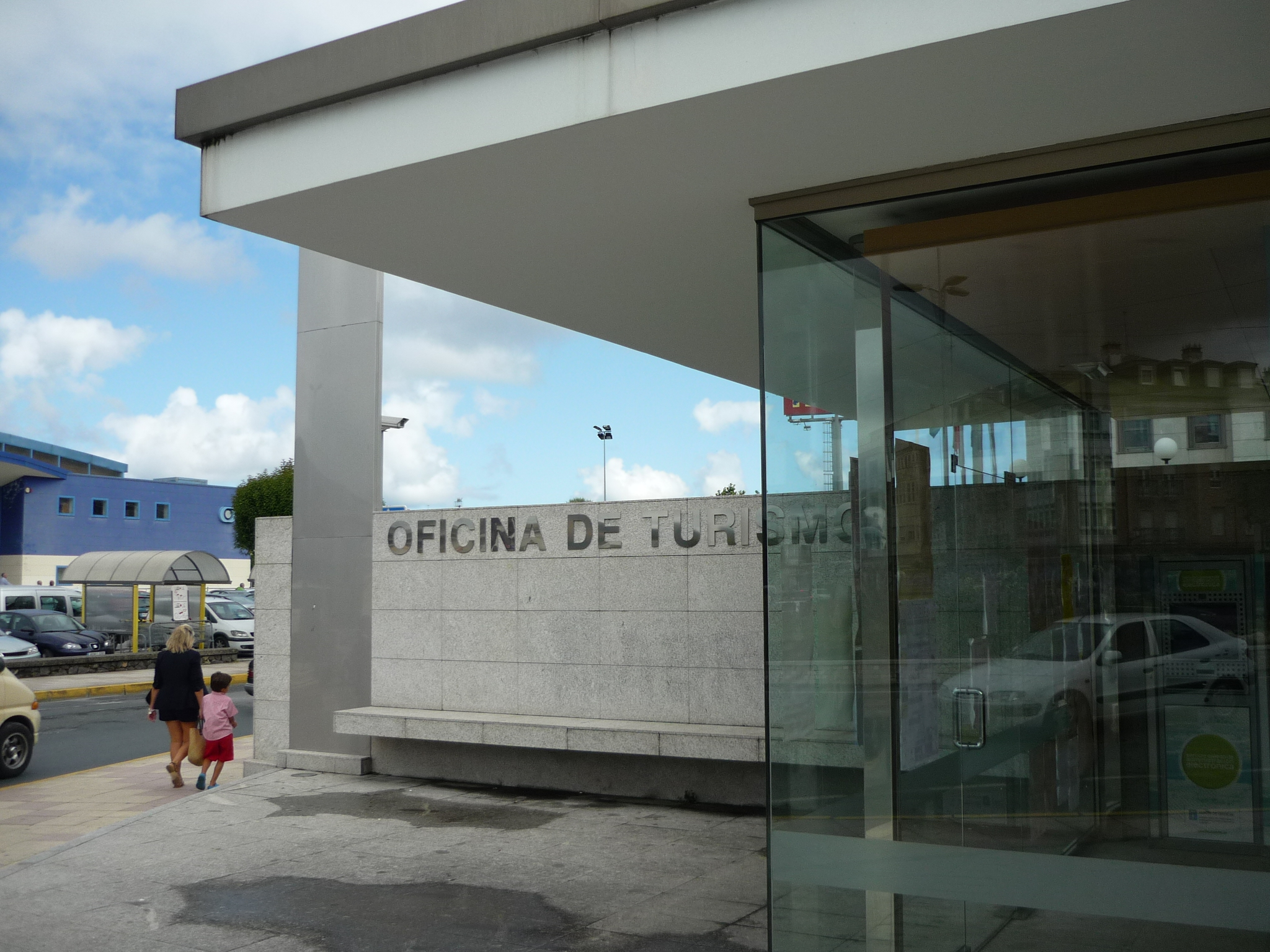 Oficina de Turismo de Viveiro